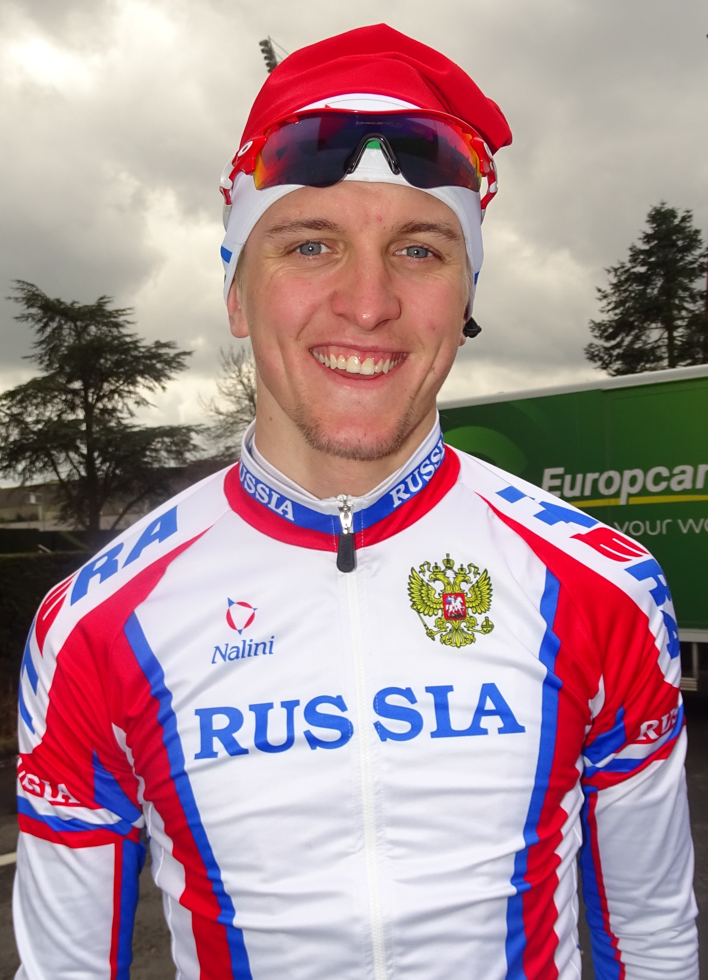 Reportage réalisé le samedi 11 avril à l'occasion du départ et de l'arrivée du Tour des Flandres espoirs 2015 à Audenarde, Belgique.